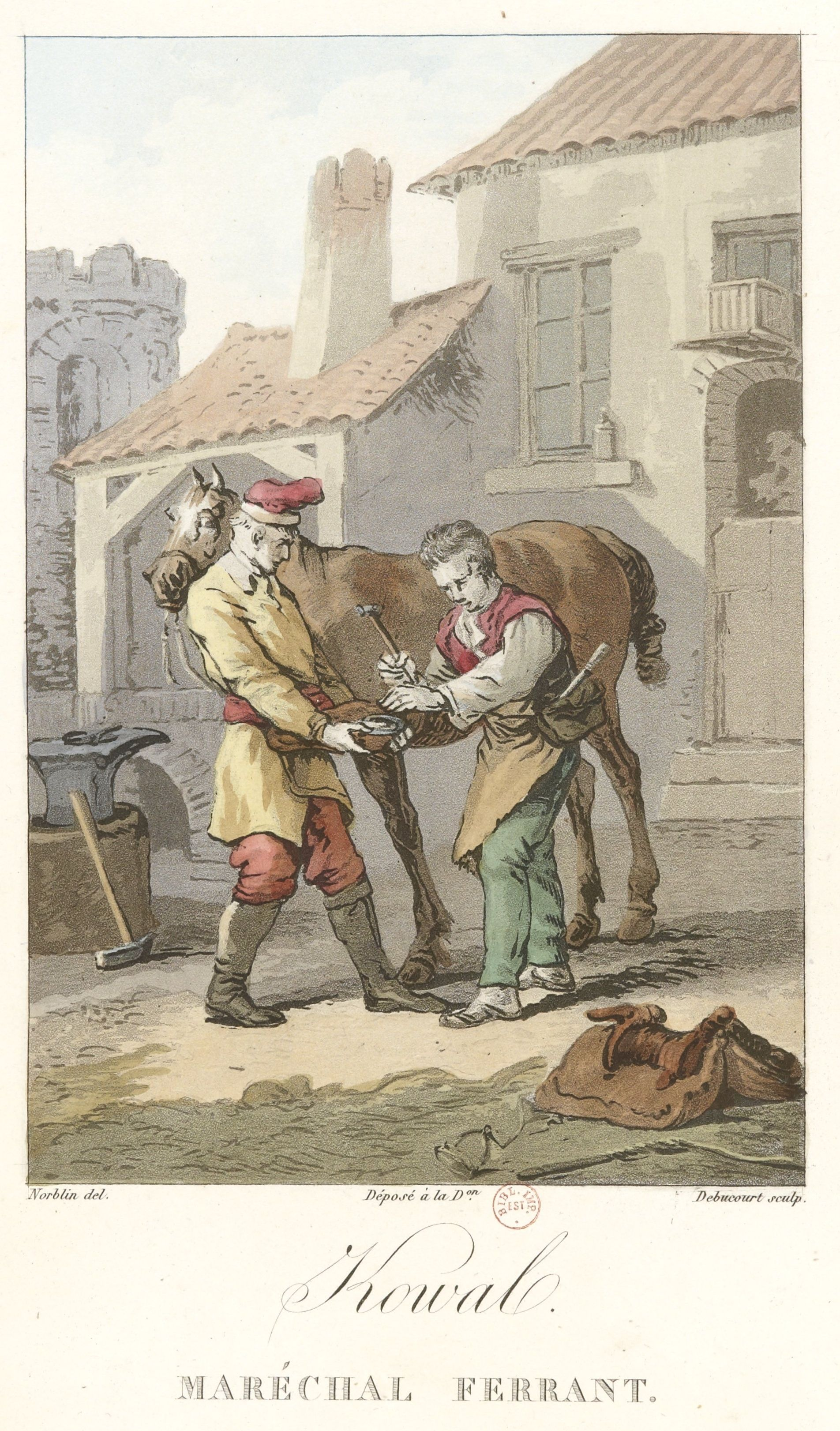 Кузнец